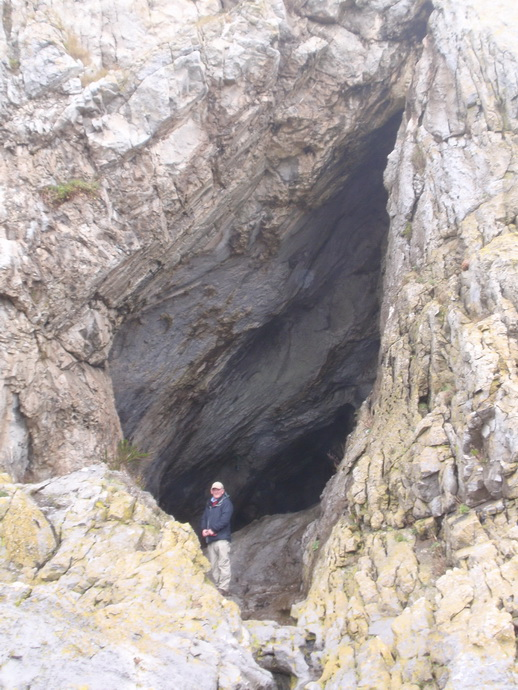 Eingang der Paviland-Cave (auch Goat's Hole) auf der Gower-Halbinsel in Wales.